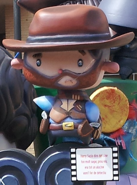 Falla infantil de 2015